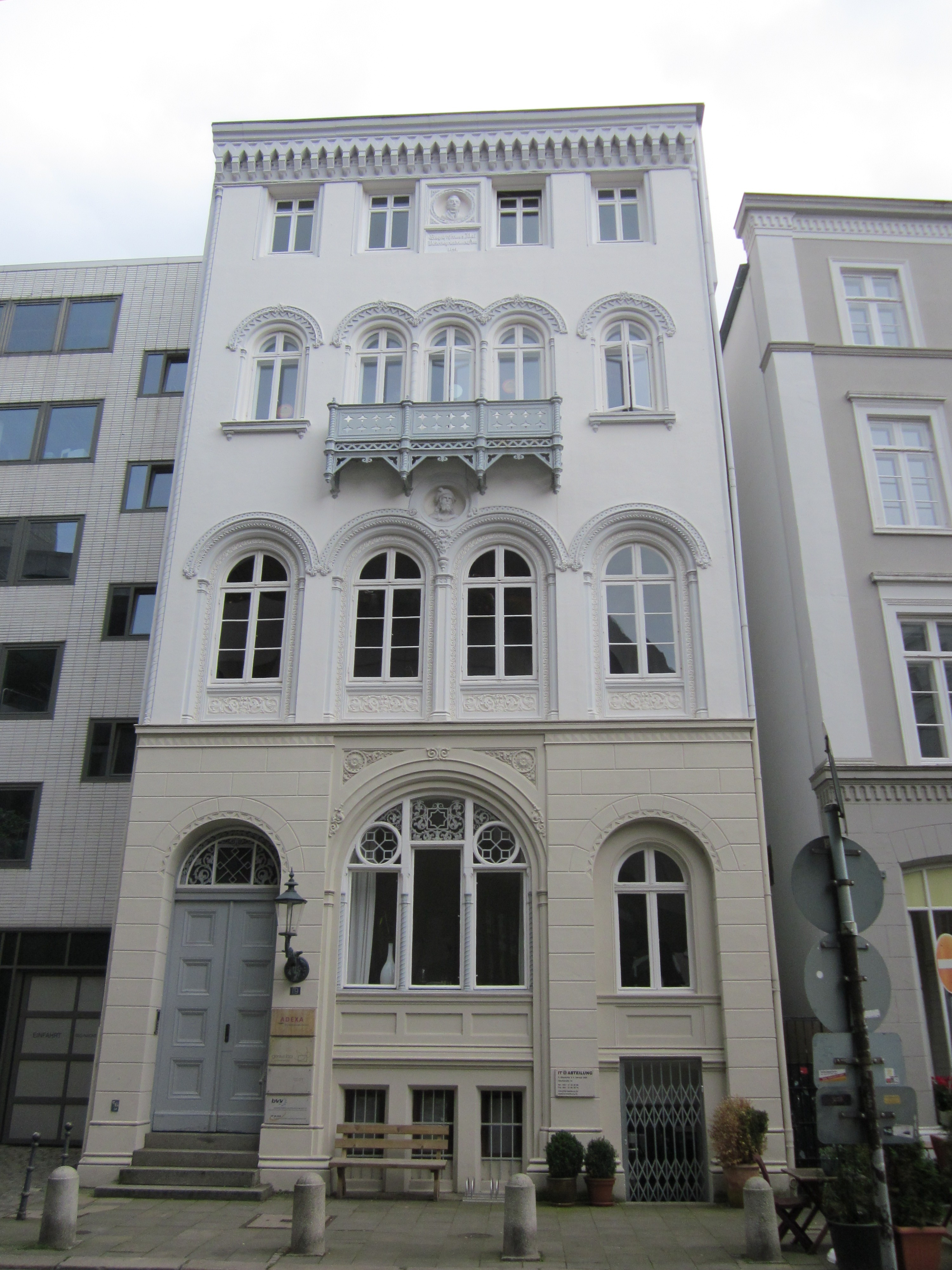 Das Haus Deichstraße 19 in der Hamburger Altstadt wurde 1842 nach dem Hamburger Brand für den Oberalten Johann Heinrich Schäffer von Georg Luis im typischen Rundbogenstil des romantischen Historismus erbaut.This is a photograph of an architectural monument.